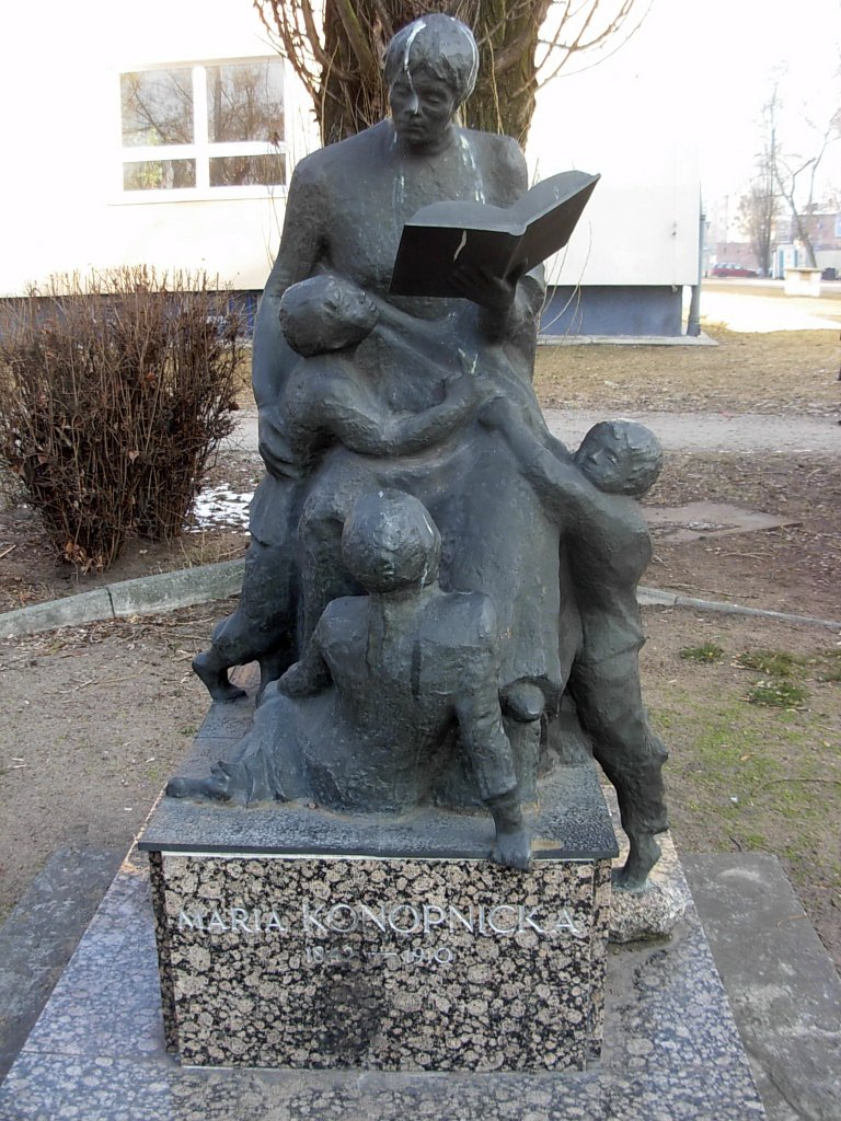 Pomnik Marii Konopnickiej w Bydgoszczy. Autorką jest Krystyna Panasik - artysta rzeźbiarz.